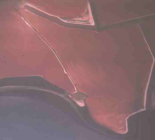 Luftaufnahme einer Saline an der Küste des Pazifik bei San Francisco